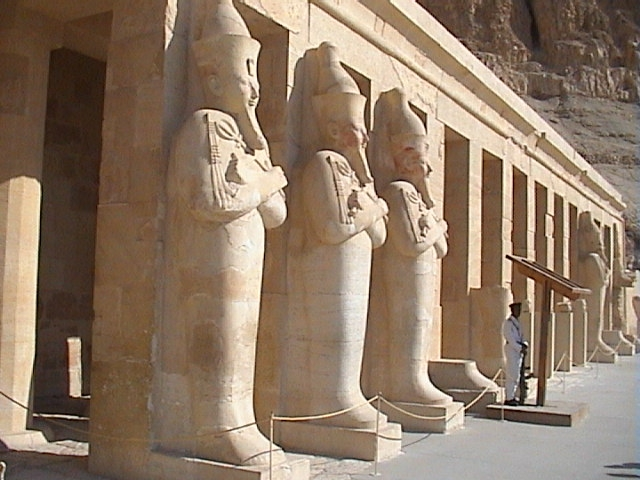 Façade de la seconde terrasse du temple d'Hatchepsout ornée de colosses osiriaques à l'effigie de la reine - Deir el-Bahari - XVIIIe dynastie égyptienne